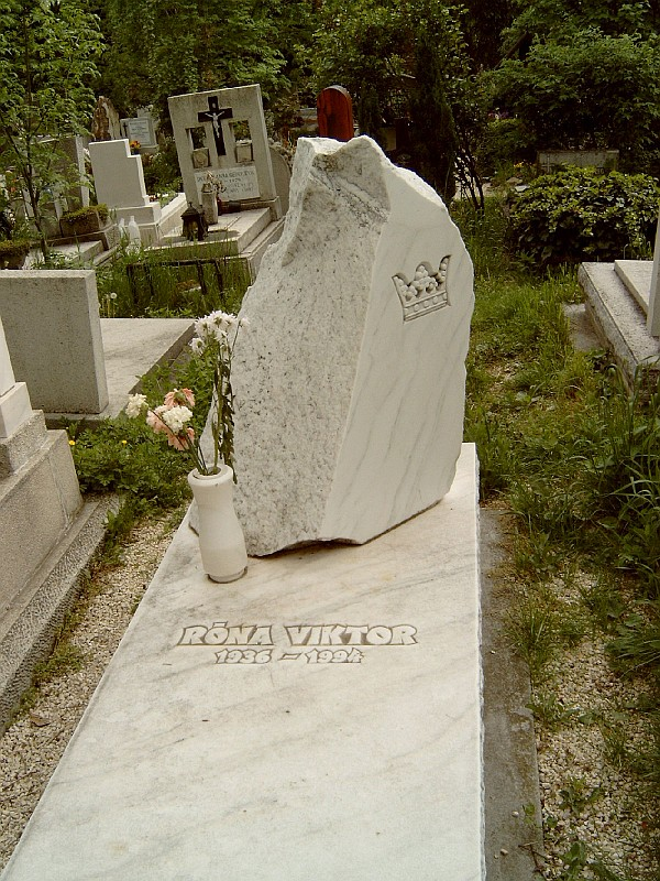 Róna Viktor (Bp., 1936. aug. 17.– 1994. január 15.) táncos, koreográfus, balettigazgató sírja Budapesten. Farkasréti temető: 25-6-57/1.